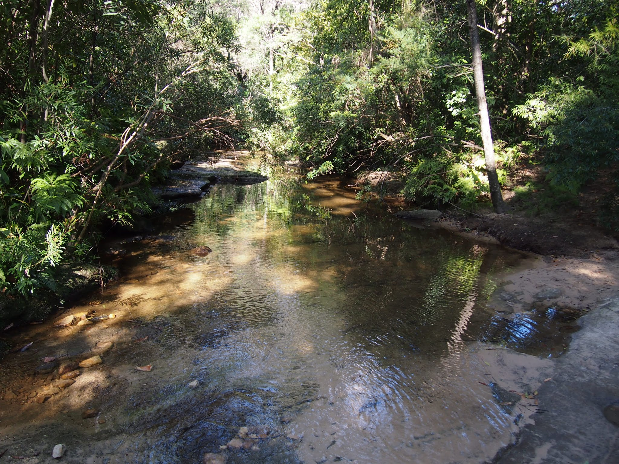 Bare Creek